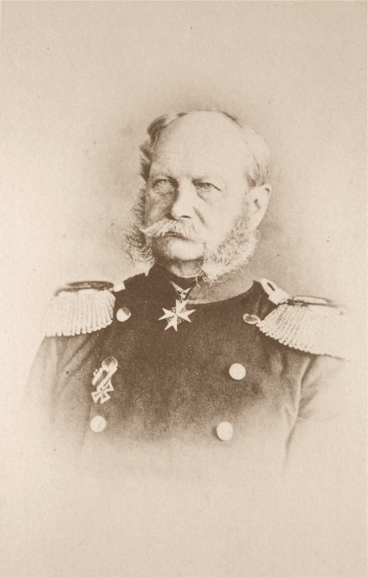 Prinzregent Wilhelm von Preußen